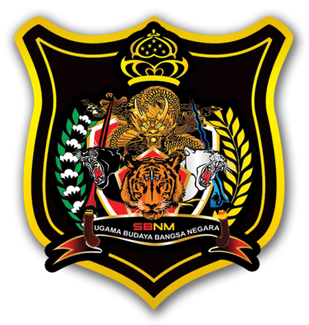 Pertubuhan Perguruan Seni Silat Saga Barong Naga Malaya